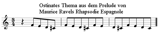 Beschreibung: Ausschnitt aus Maurice Ravels Prélude à la nuit (Rhapsodie espagnole) Quelle: Maurice Ravel, gezeichnet von Boris Fernbacher Fotograf / Zeichner: Boris Fernbacher 13:54, 6. Jan 2006 (CET) Andere Versionen: Lizenz der Musik Kurzauszug zitiert nach Zitatrecht. Musik wird am 1.1.2008 gemeinfrei durch Alter (Ravel: † 1937). Lizenz des Notenbilds